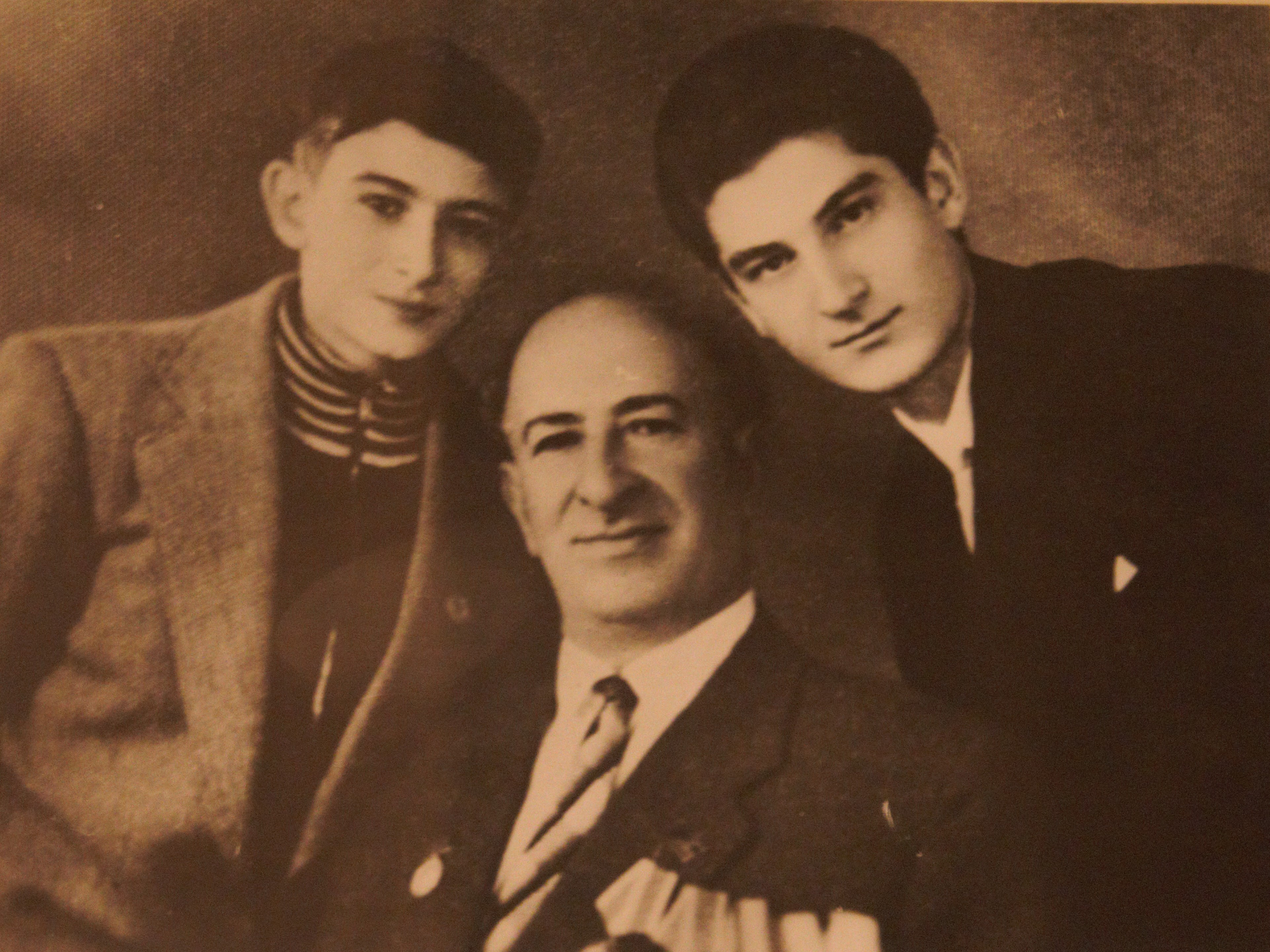 Бюльбюль с сыновьями Чингизом и Поладом